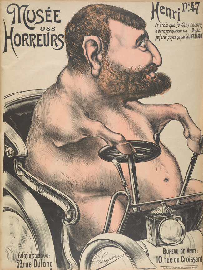 "Henri".